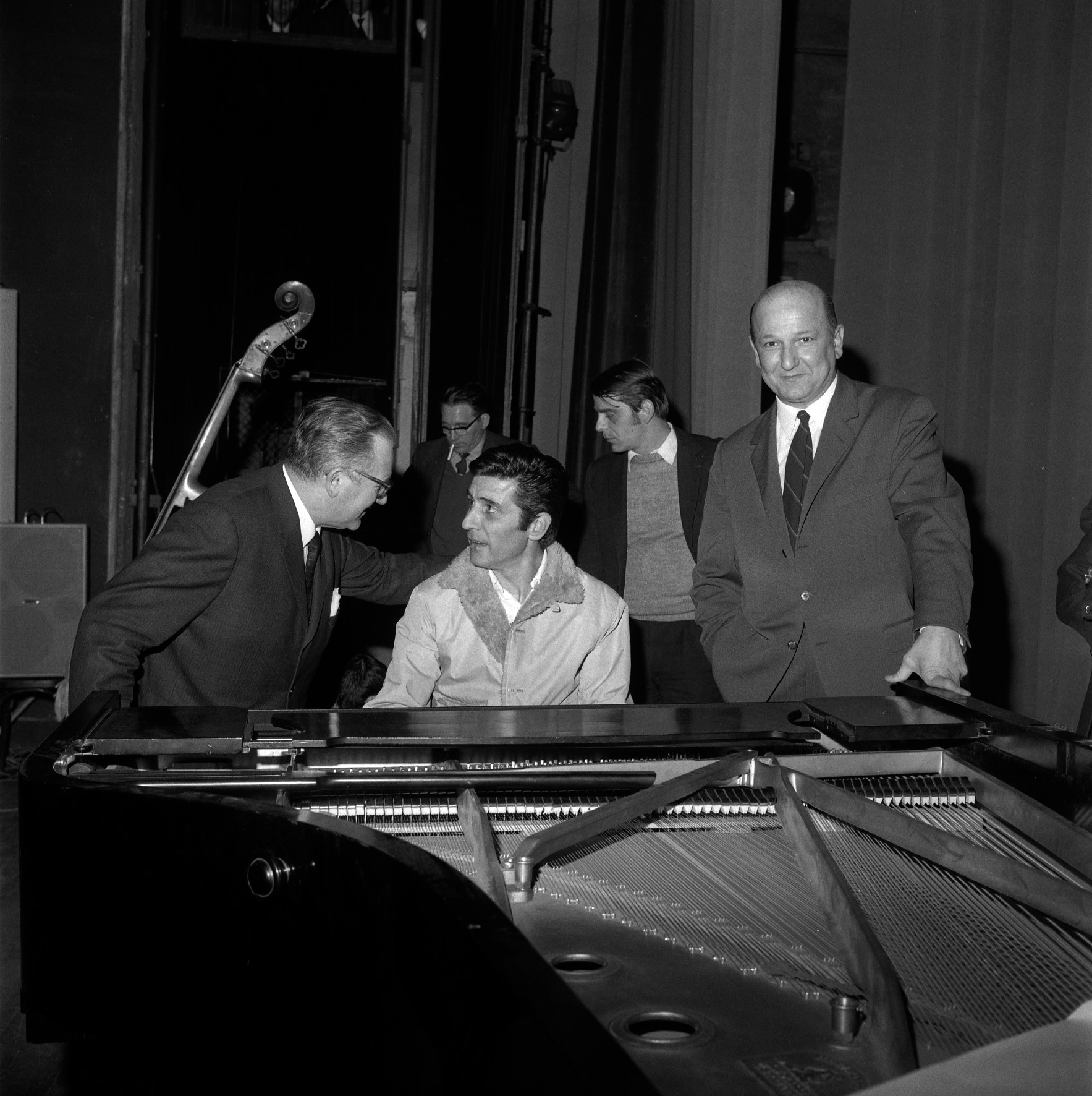 intérieur du théâtre du Capitole. Le 23 mars 1968. Vue de Gilbert Bécaud derrière son piano au théâtre du Capitole.